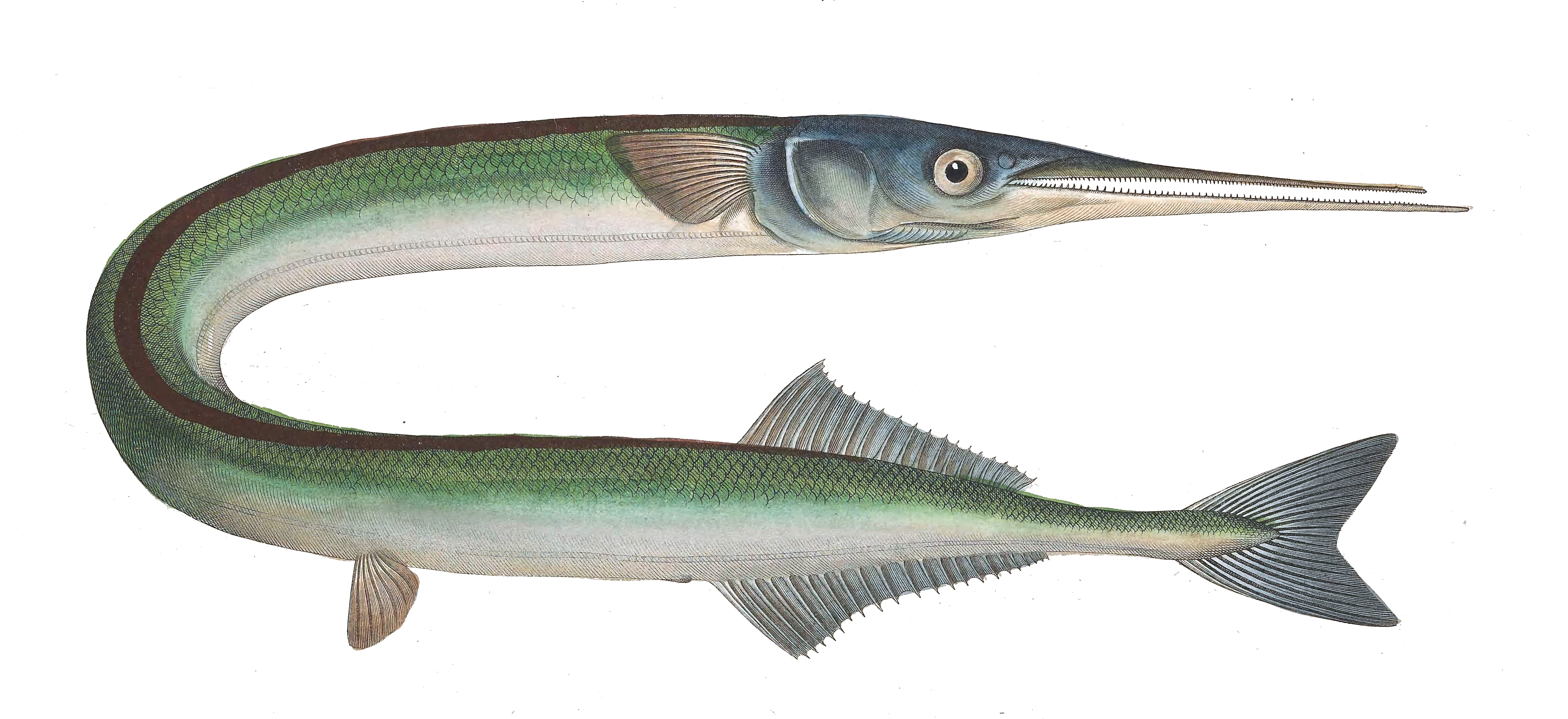 Belone belone